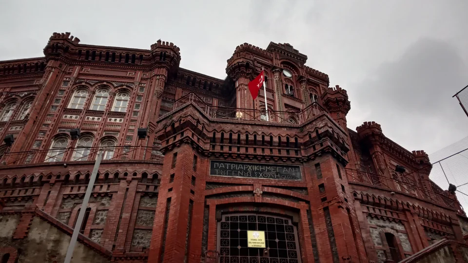 Front of the building of Phanar Greek Orthodox College.